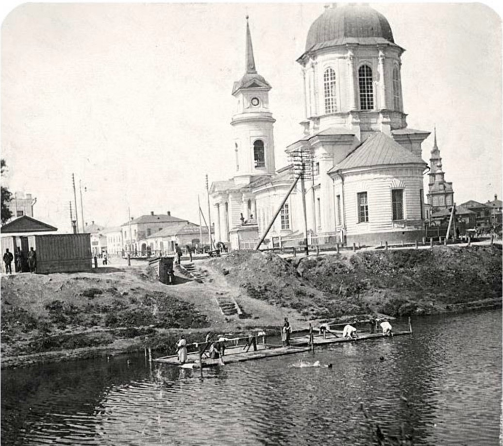 Храм в честь Сретения Господня в Туле